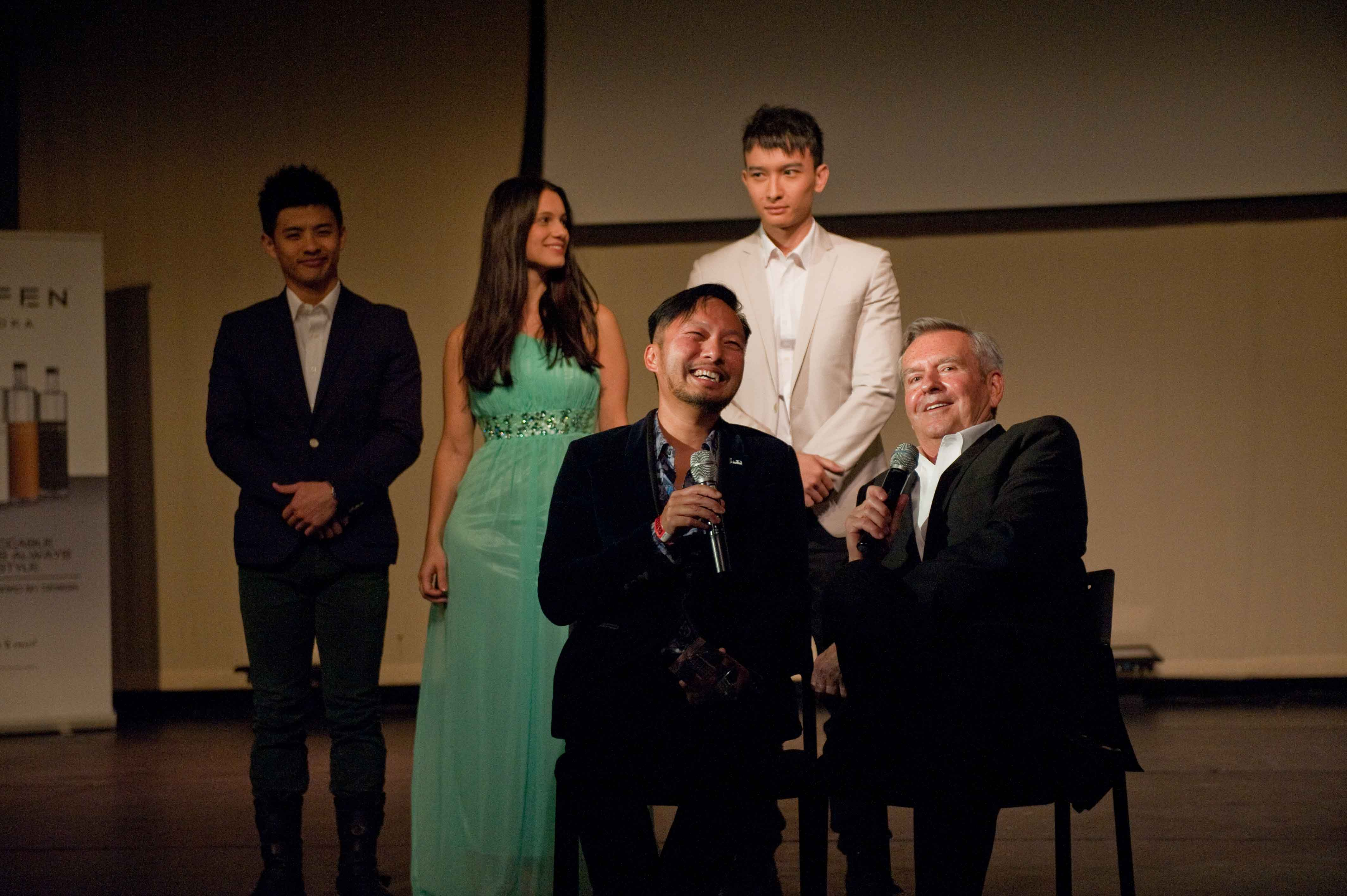 雲翔的最新作品《遊》入圍了第四十九屆芝加哥國際電影節，同時導演雲翔也獲大會頒發了”藝術成就獎”，表揚雲翔於「男女同志，雙性戀及跨性別」（LGBT）電影界的努力和貢獻。